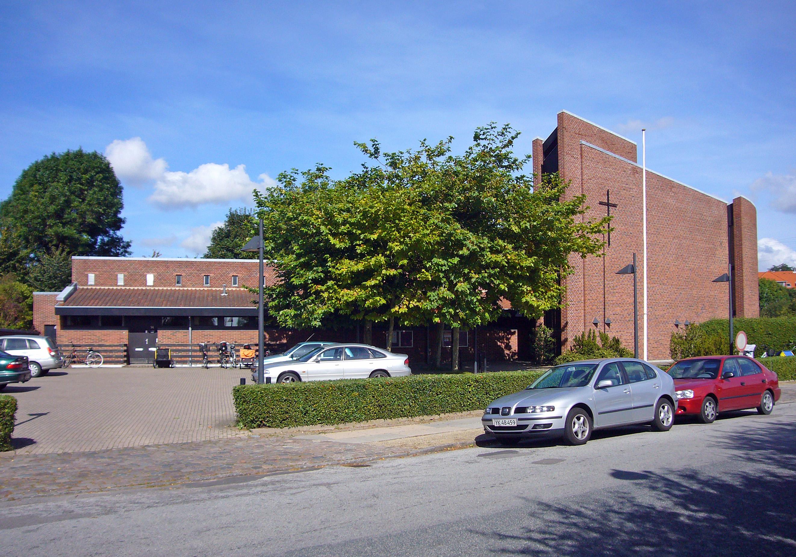 Husum Kirke, Brønshøj, Copenhagen, Denmark. Husum Kirke